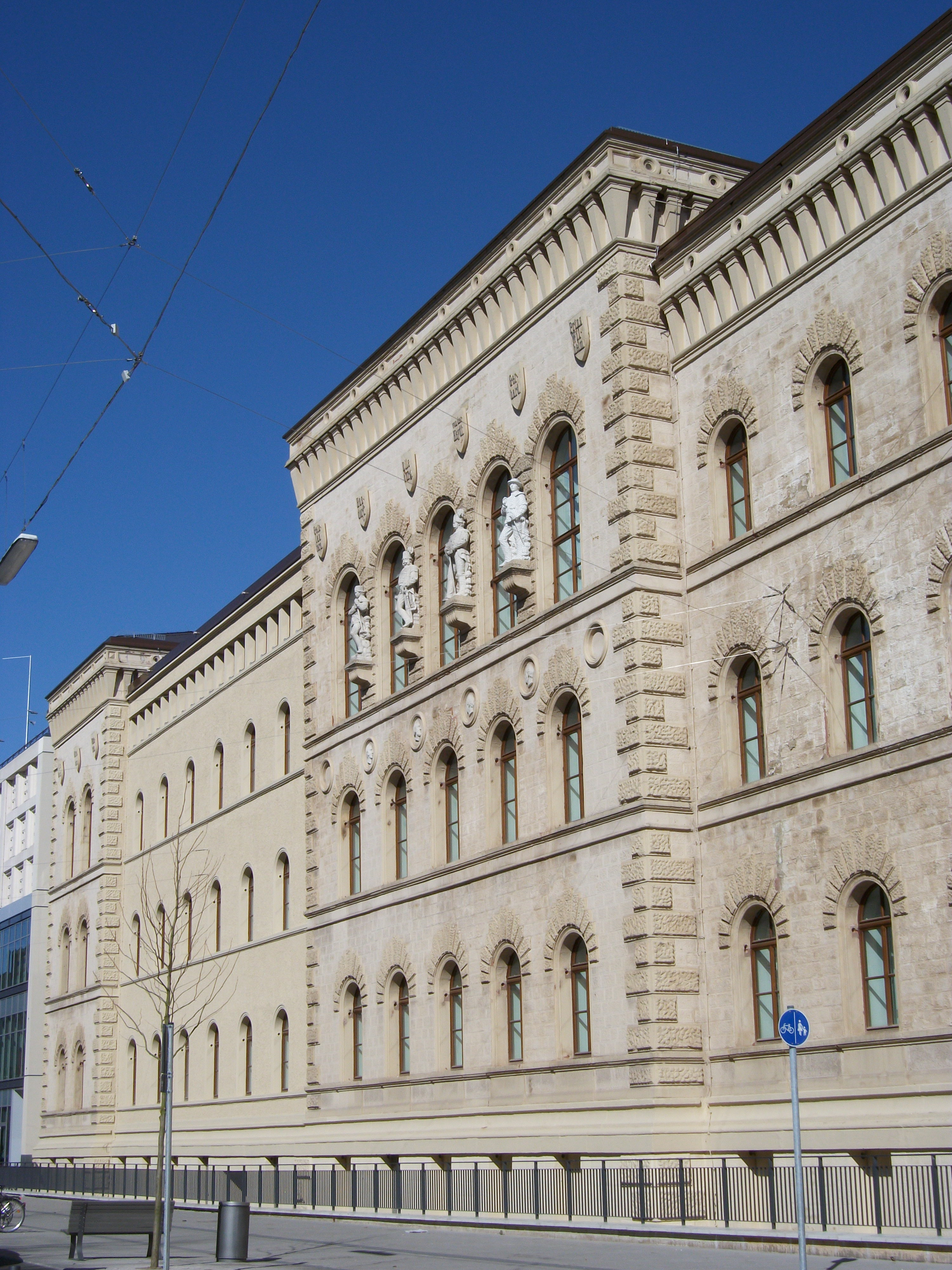 Bergwerksdirekrion Saarbrücken, heute "Europagalerie"